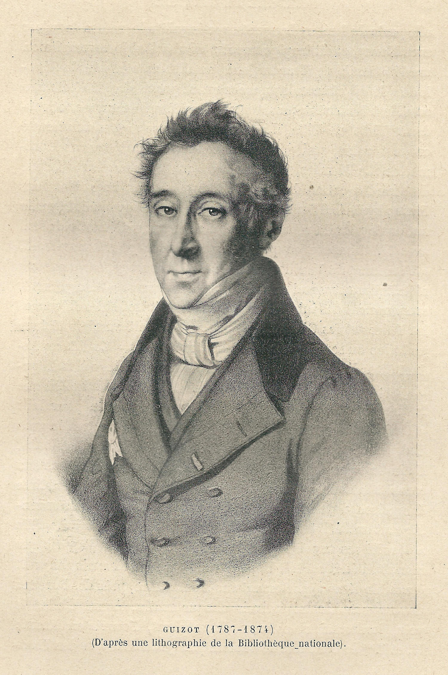 François Guizot ; lithographie